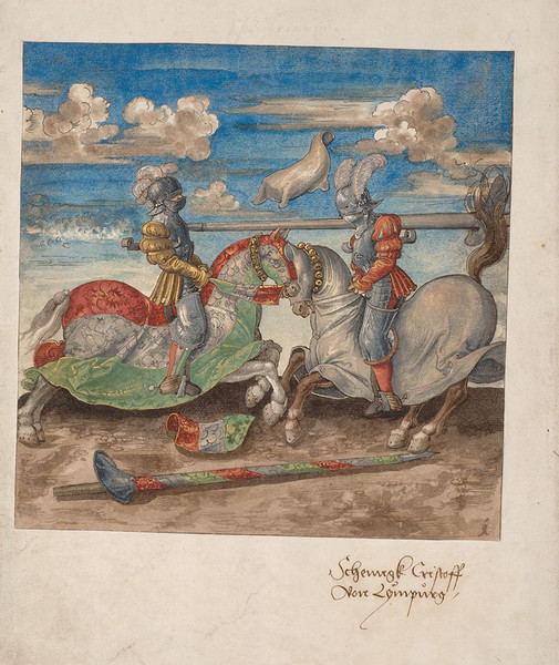 Seite aus dem Turnierbuch „Freydal“, KHM Wien, MS KK5073